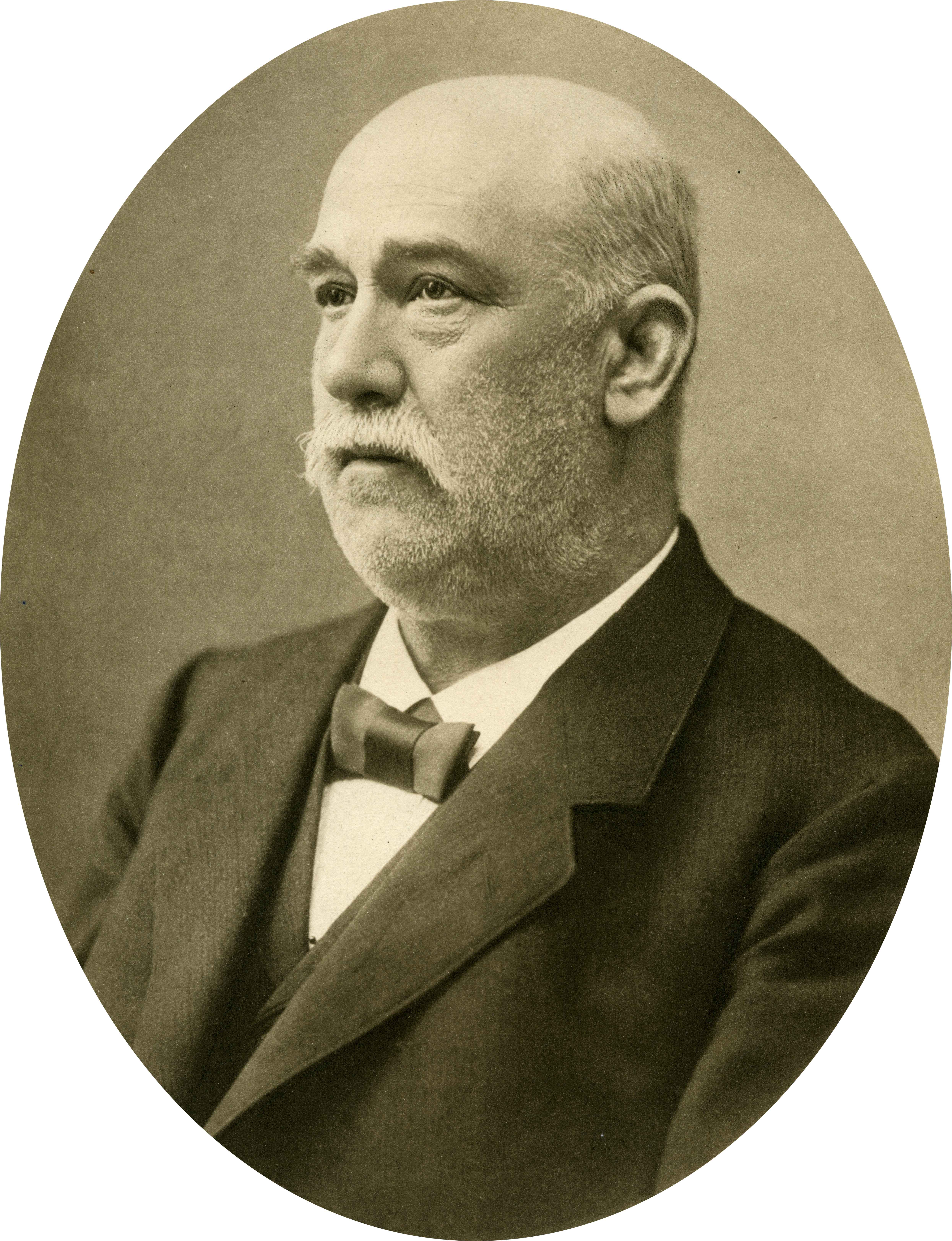 Paul Schleber (1849-1936), Leiter der Georg Schleber AG in Reichenbach im Vogtland